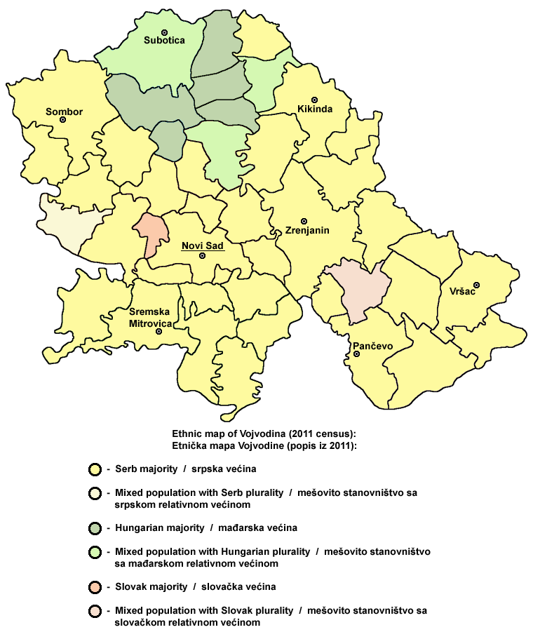 Vojvodina ethnic map - data by cities and municipalities (2011 census).Etnička mapa Vojvodine - podaci po gradovima i opštinama (popis 2011).